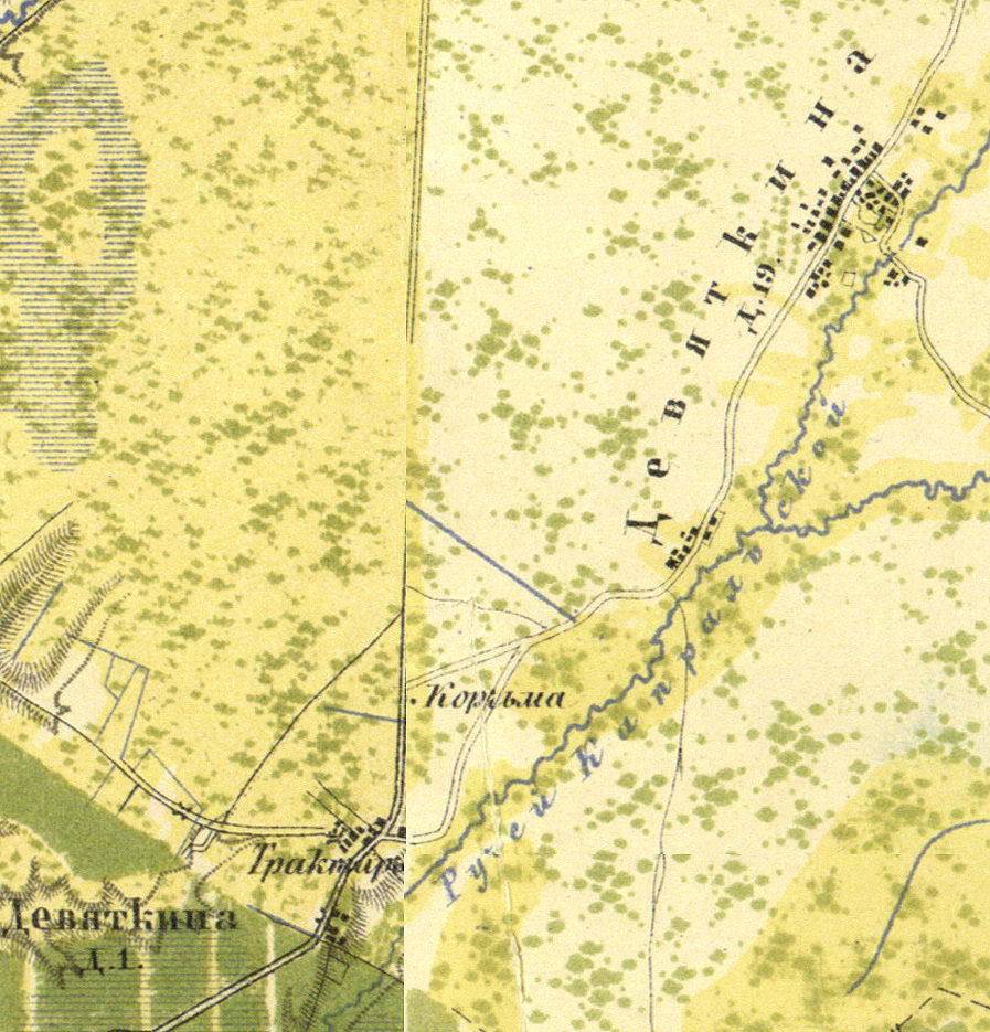 Деревни Девяткино на карте 1860 года.